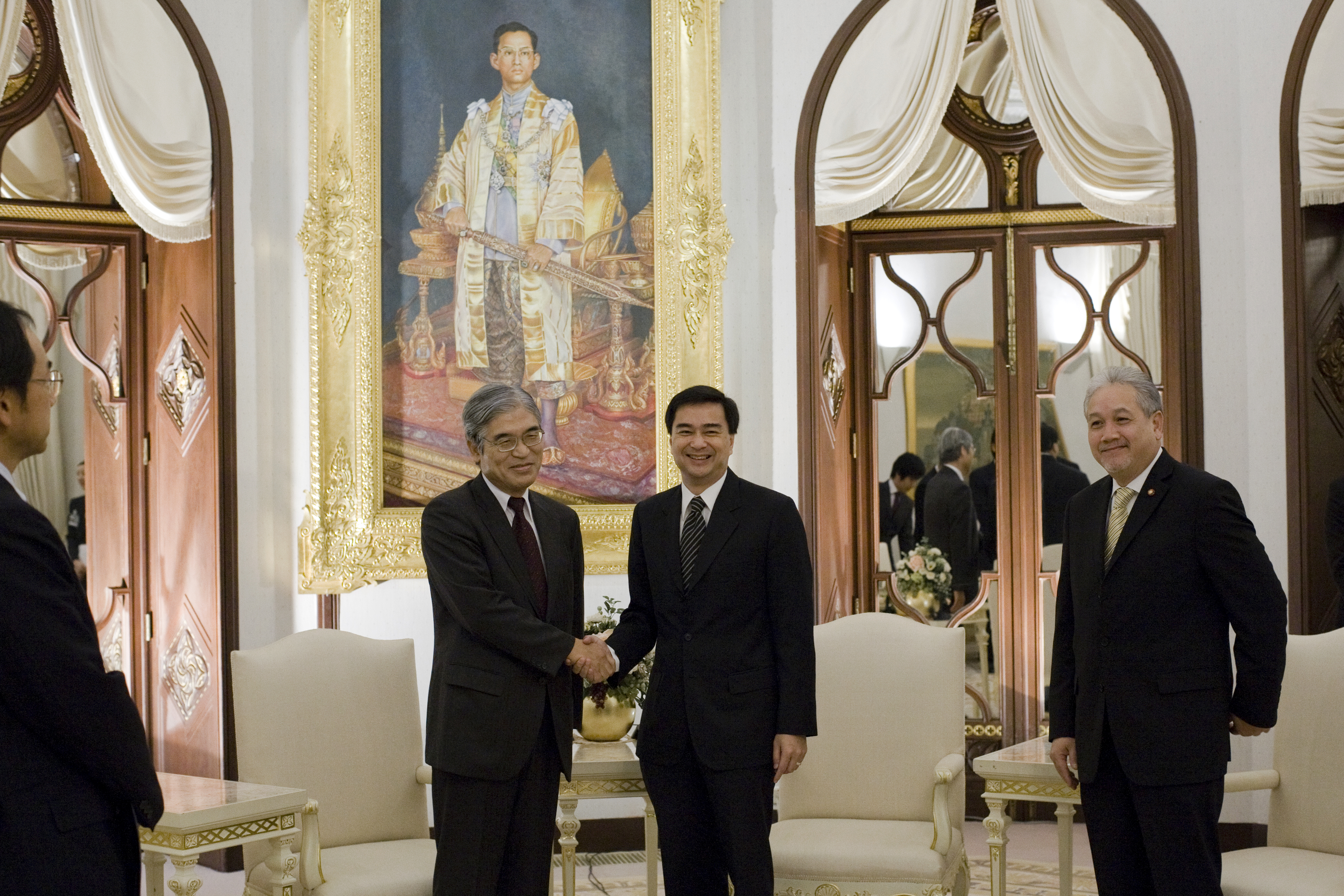 H.E.Mr.Seiji Kojima เอกอัครรชทูตวิสามัญผู้มีอำนาจเต็มแห่งญี่ปุ่นประจำประเทศไทย เข้าเยี่ยมคารวะนายกรัฐมนตรีในโอกาสเข้ารับหน้าที่ใหม่ ณ ห้องสีงาช้าง ตึกไทยคู่ฟ้า ทำเนียบรัฐบาล วันจันทร์ ที่ 7 กุมภาพันธ์ พ.ศ.2554 (Photographer attached to the Prime Minister of the Kingdom of Thailand (H.E.Mr.Abhisit Vejjajiva) : Peerapat Wimolrungkarat / พีรพัฒน์ วิมลรังครัตน์) @is50mm